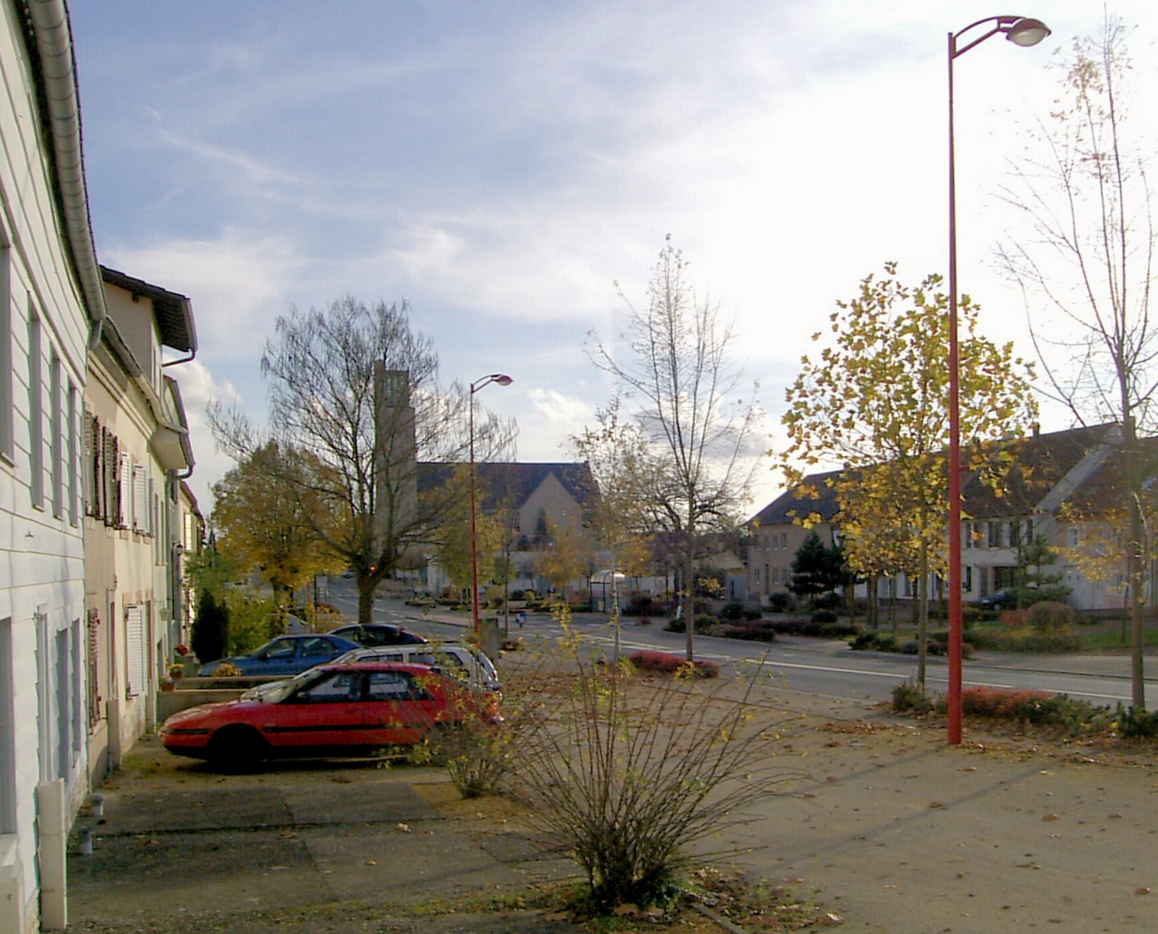 La rue Principale de Willerwald, derrière l'église Saint-Nicolas